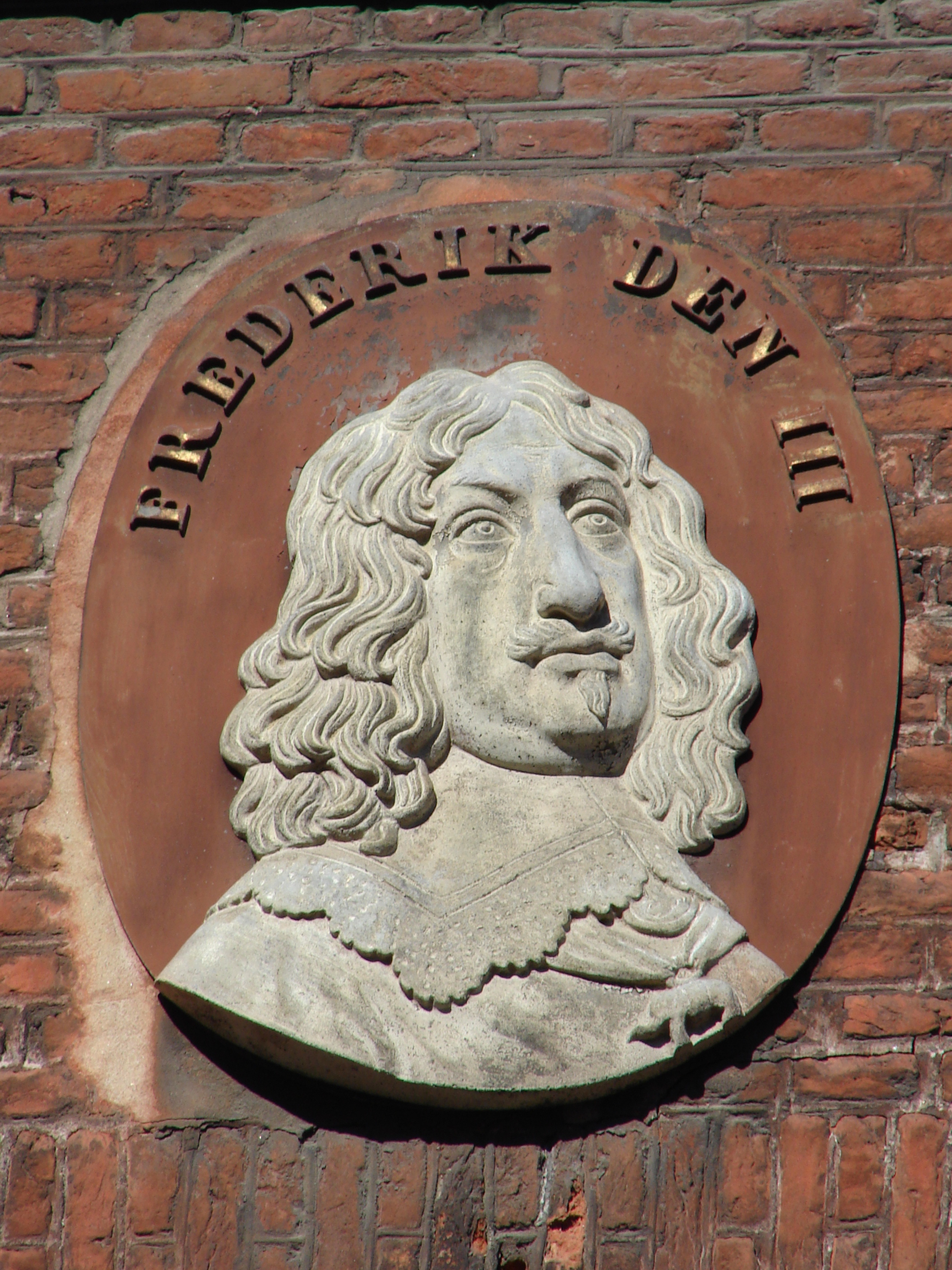 Mindemedaljon med portræt af Frederik den III af Danmark og Norge til minde om generalstormen på København natten mellem den 10de & 11te februar 1659, ved Vandkunsten i København